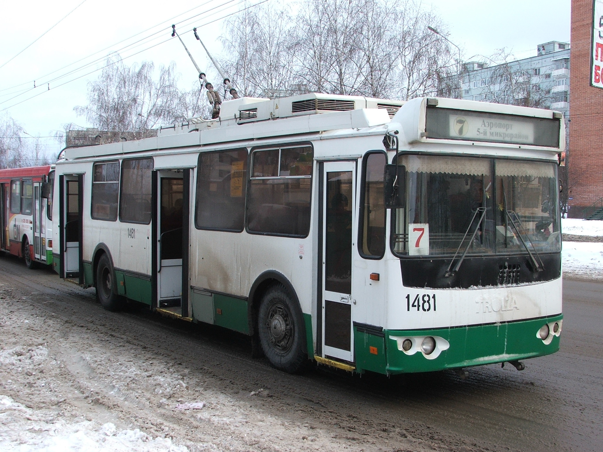 Троллейбус ЗиУ-682Г-016.02 на проспекте Строителей в г. Пензе.